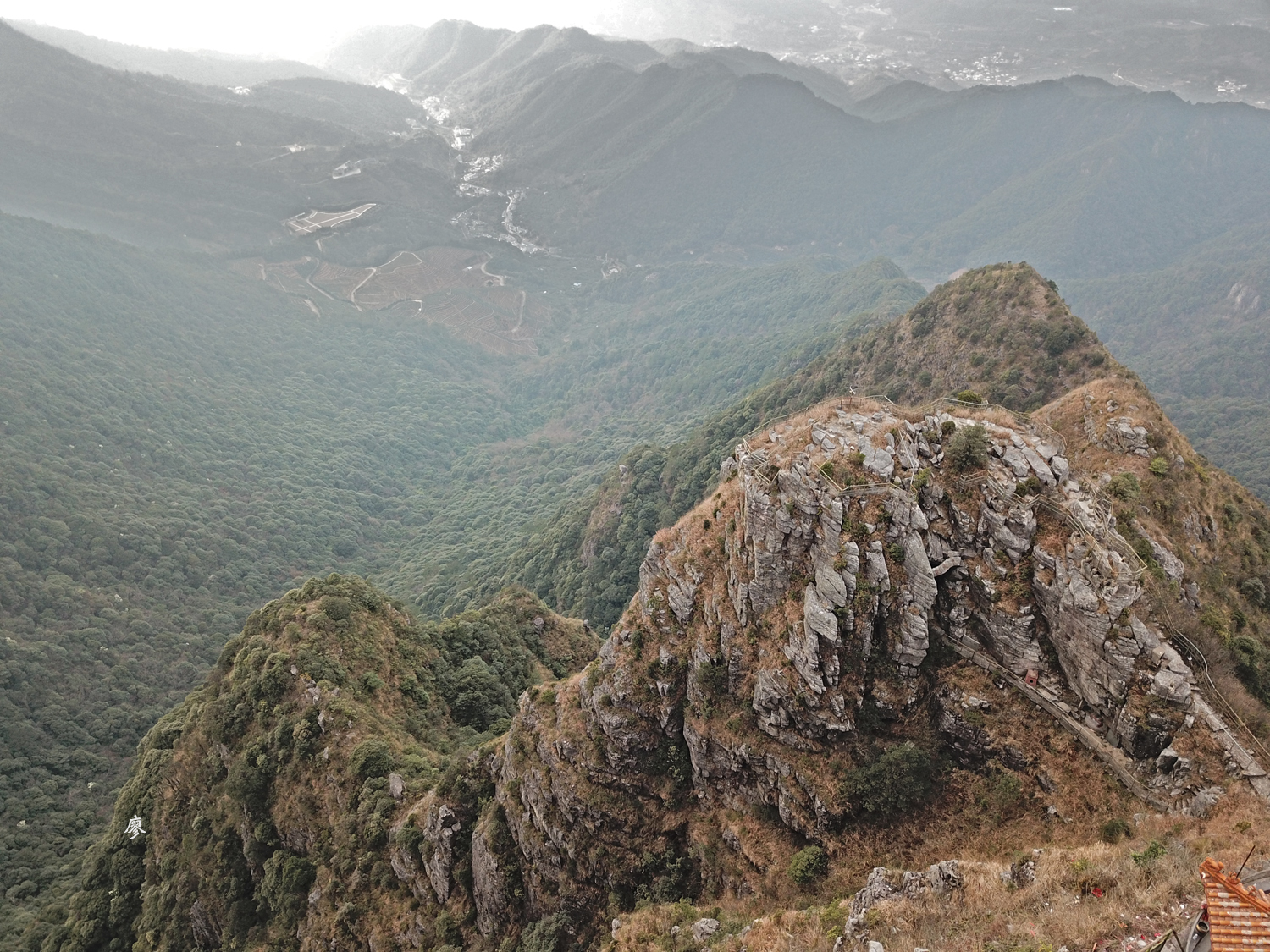 中文（中国大陆）: 梅州五指山